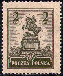 Пошльа. Восьмой стандартный выпуск. 2 гроша 1925 г.